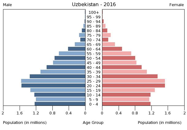 A population pyramid illustrates the age and sex structure of a country's population and may provide insights about political and social stability, as well as economic development. The population is distributed along the horizontal axis, with males shown on the left and females on the right. The male and female populations are broken down into 5-year age groups represented as horizontal bars along the vertical axis, with the youngest age groups at the bottom and the oldest at the top. The shape of the population pyramid gradually evolves over time based on fertility, mortality, and international migration trends.